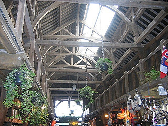 Etretat, intérieur des halles Photo prise par l'utilisateur Urban Libre de droits, GFDL